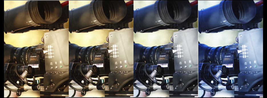 Ejemplo de cómo varía la colorimetría de una imagen con diferentes balances de blancos.